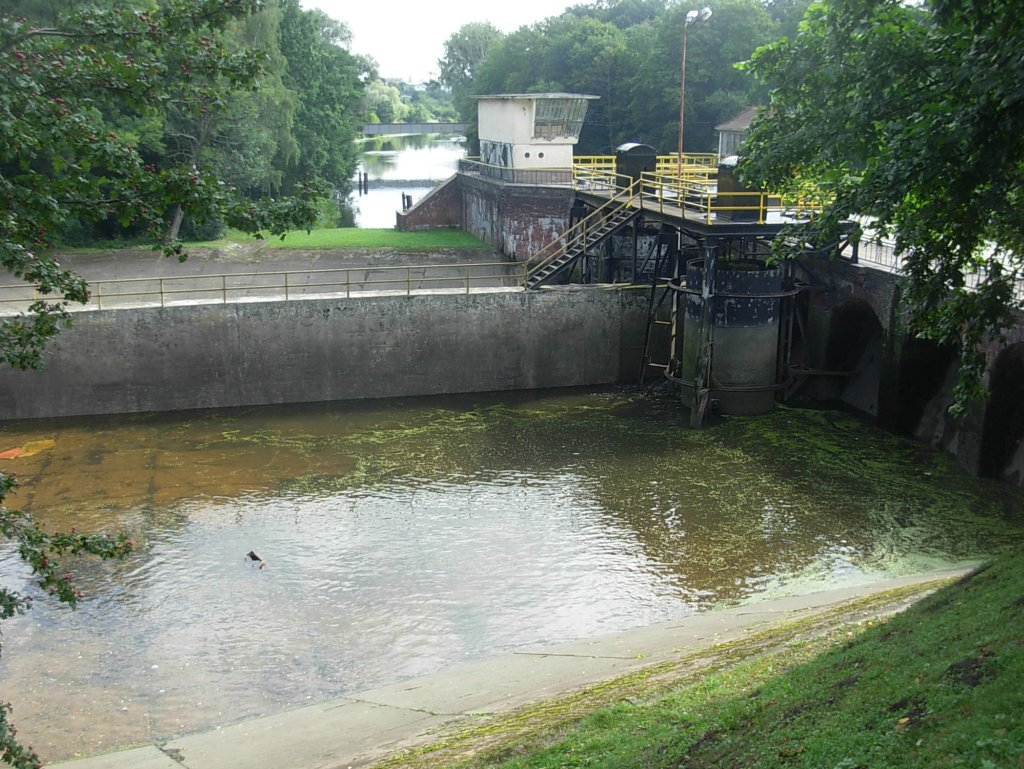 Śluza Okole na Kanale Bydgoskim - zbiornik oszczędnościowy